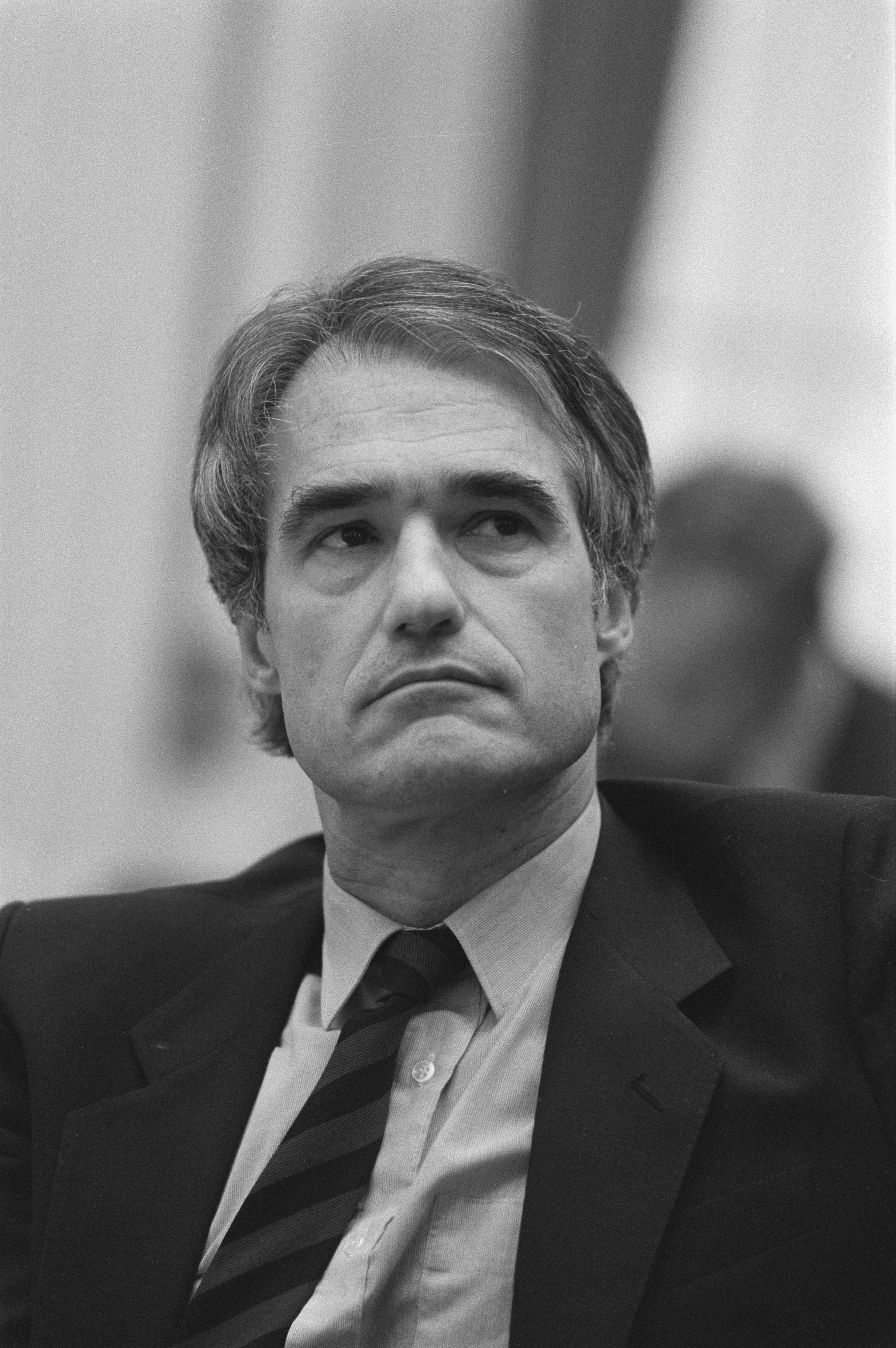 Collectie / Archief : Fotocollectie Anefo Reportage / Serie : [ onbekend ] Beschrijving : Kamerleden; dr. Rudolf W. de Korte (VVD), koppen Datum : 6 maart 1985 Trefwoorden : Kamerleden Instellingsnaam : VVD Fotograaf : Bogaerts, Rob / Anefo Auteursrechthebbende : Nationaal Archief Materiaalsoort : Negatief (zwart/wit) Nummer archiefinventaris : bekijk toegang 2.24.01.05 Bestanddeelnummer : 933-2577